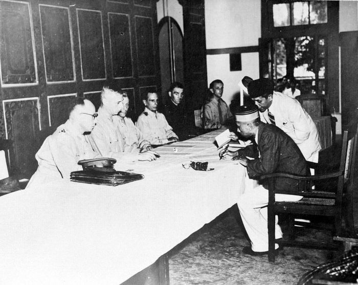 Repronegatief. Ondertekening van de Korte Verklaring door de raja van Bone op 18 juni 1946 te Watampone, Celebes